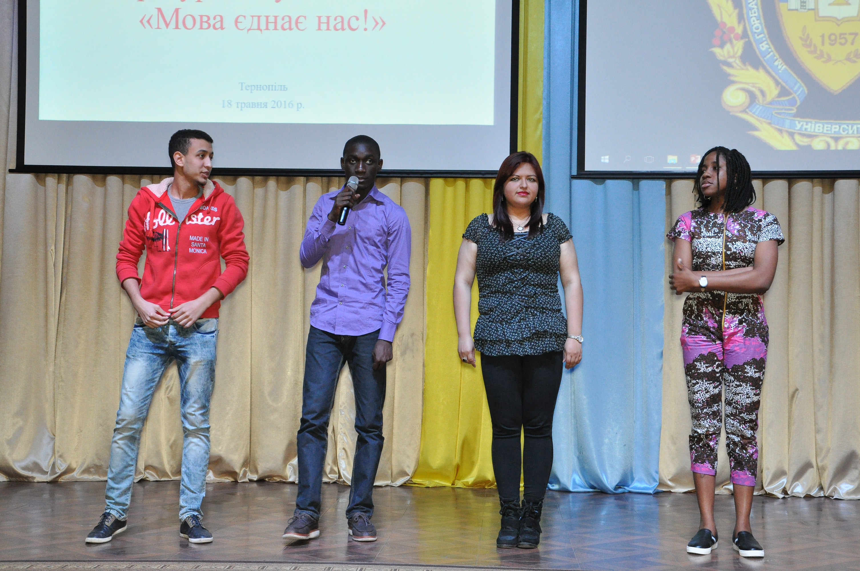 Літературно-музичне свято «Мова єднає нас», зорганізоване слухачами підготовчого відділення факультету іноземних студентів ТДМУ.